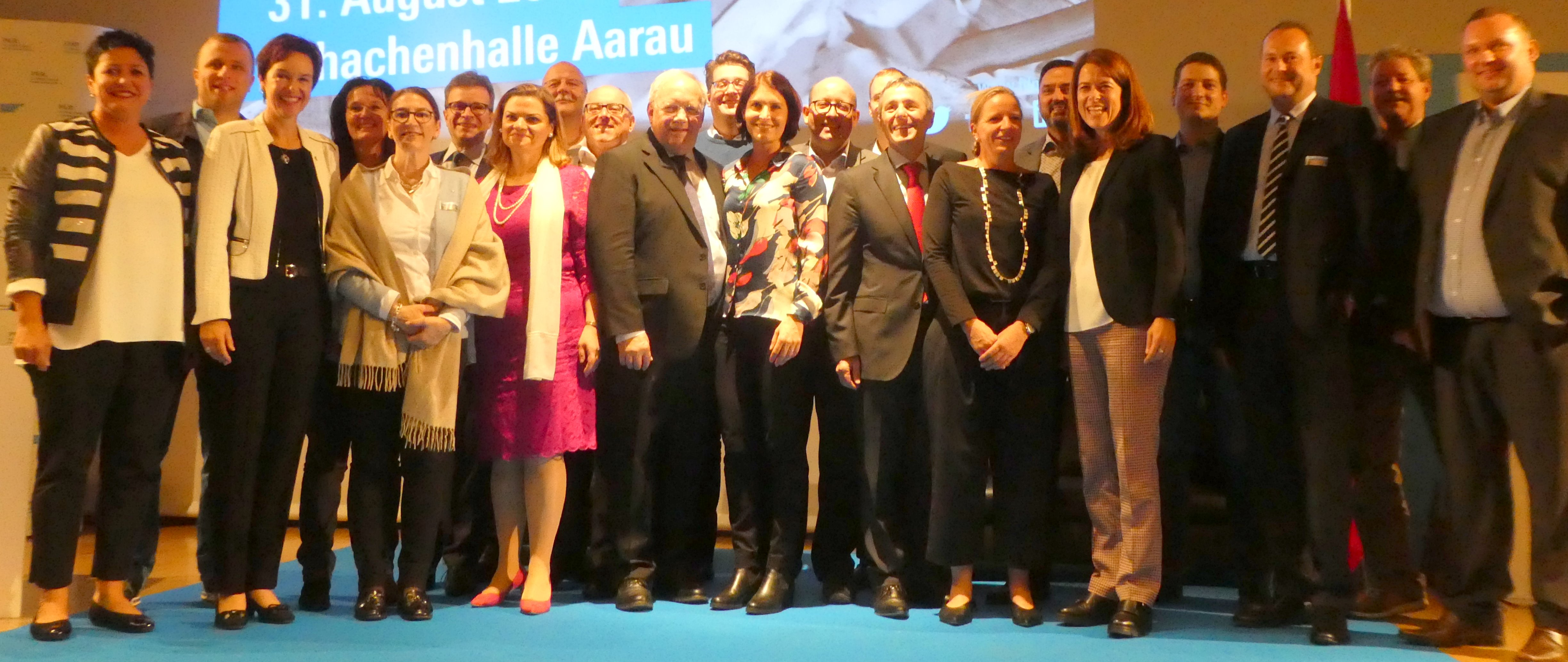 Mandatsträger der FDP Basel-Land mit den Bundesräten und der Parteipräsidentin der FDP Schweiz an einer Delegiertenversammlung der FDP.Die Liberalen Schweiz am 29. September 2018 in Pratteln/BL.